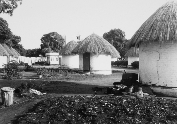 Bij elk huis hoort een kleine tuin.